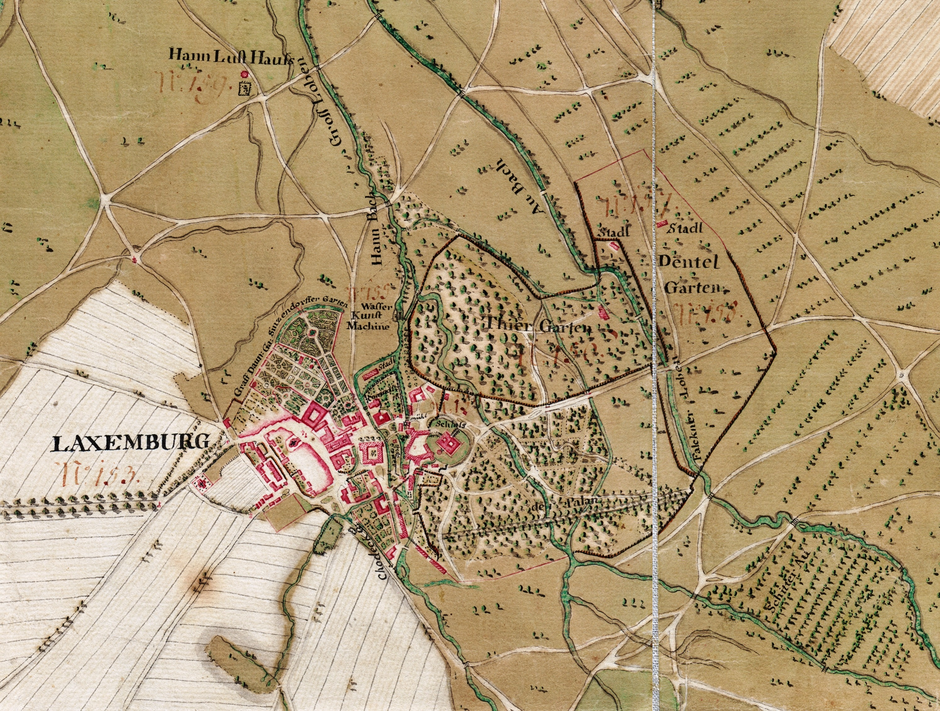 Jean Baptist Brequin de Demange (auch Demenge): Carte des environs de Schönbrun et ceux de Laxemburg, levee en Novembre et Decembre MDCCLIV et Avril MDCCLV par ordre de sa maieste imperiale et royale. Blatt 3: Laxenburg, Biedermannsdorf, Münchendorf, Achau